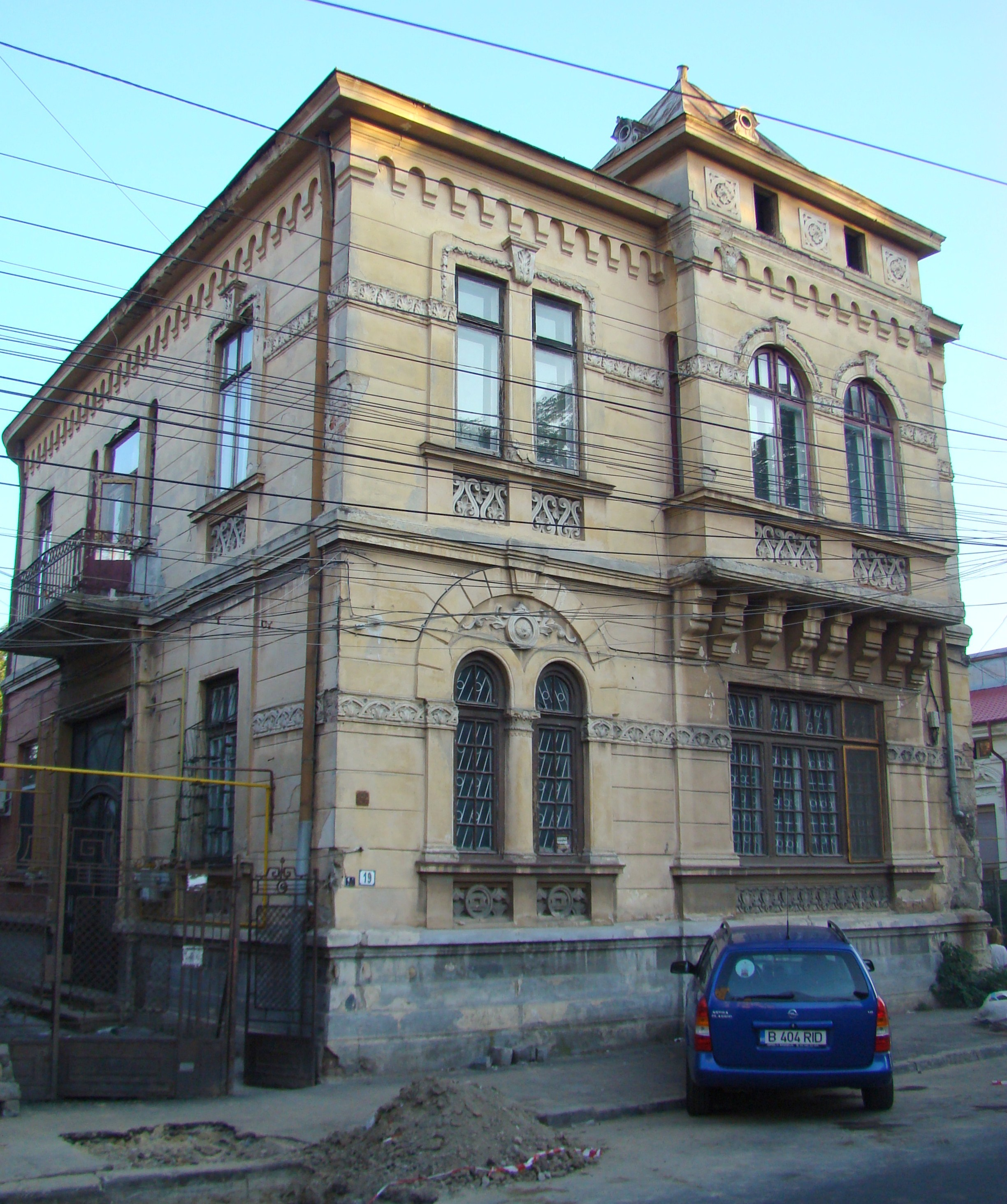 Clădire monument istoric, str. Mircea Vulcănescu, nr.19